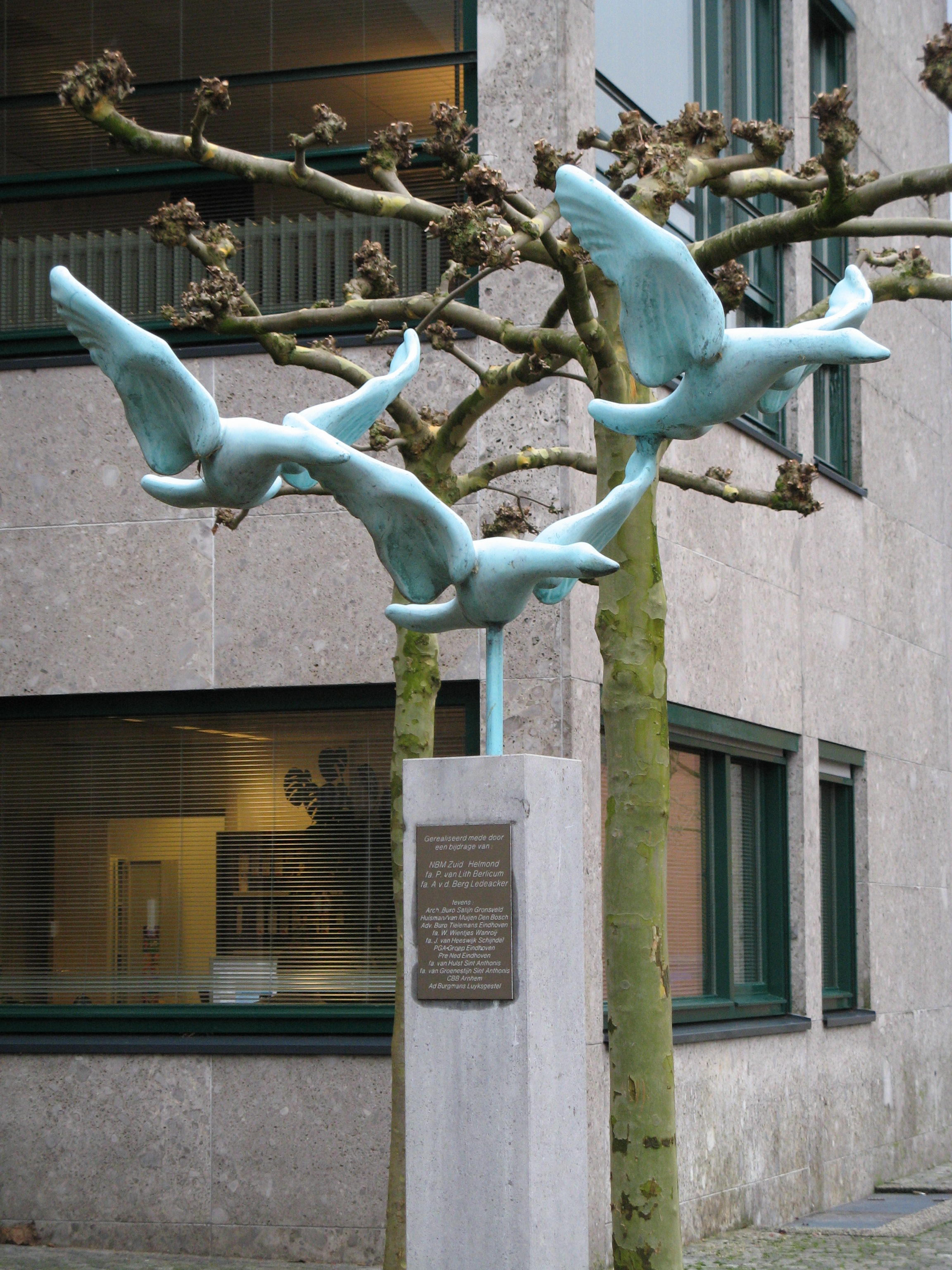 Statue "Vogelvlucht" in Sint Anthonis (NL)